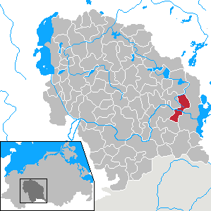 Barkhagen in Mecklenburg-Vorpommern - District Parchim